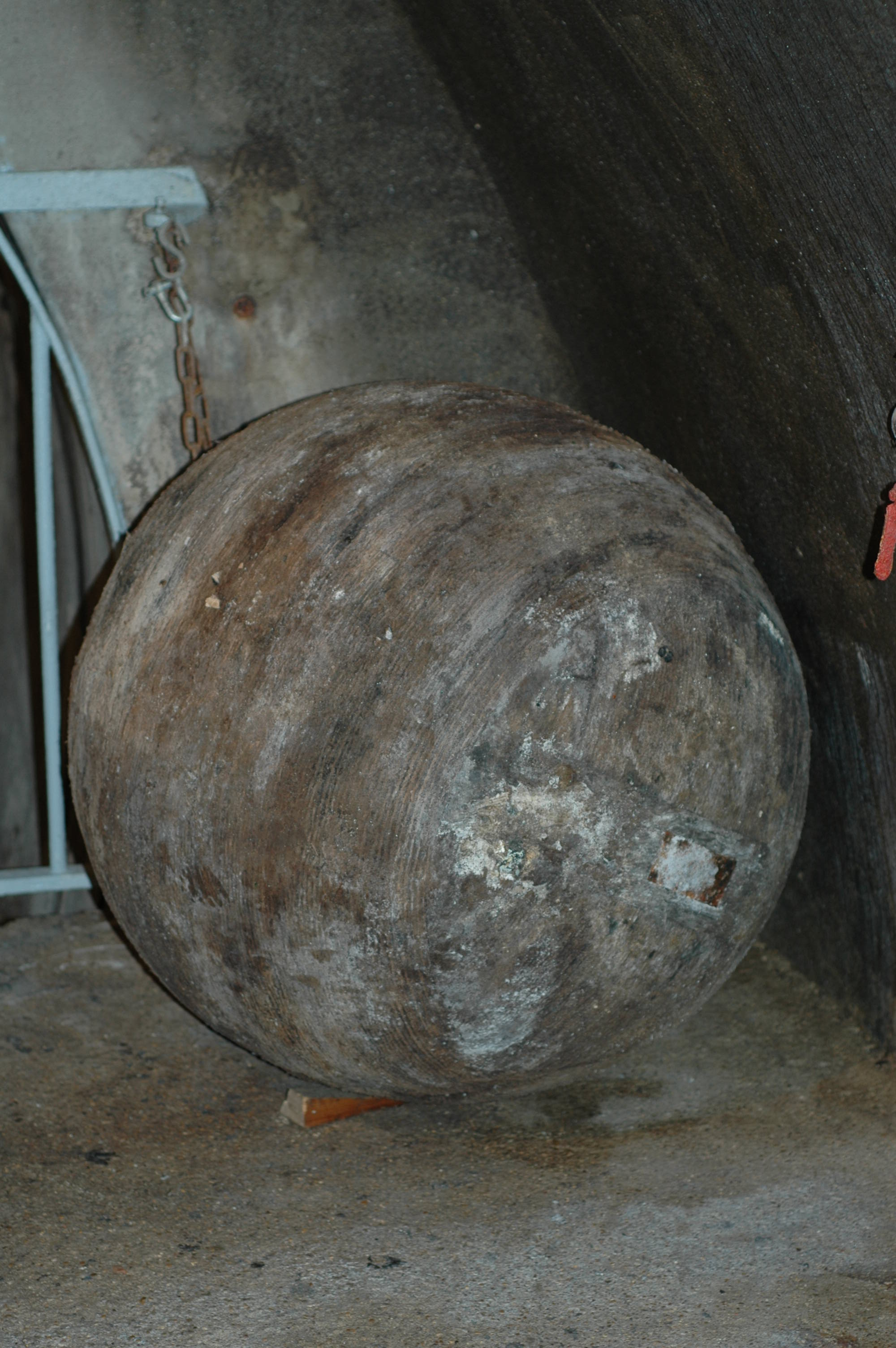 Musée des égouts de Paris. Boule de nettoyage